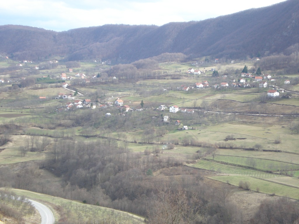 Село Копљевићи код Мркоњић Града